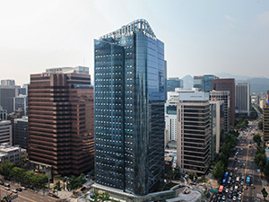 KEB하나은행 을지로 신축본점